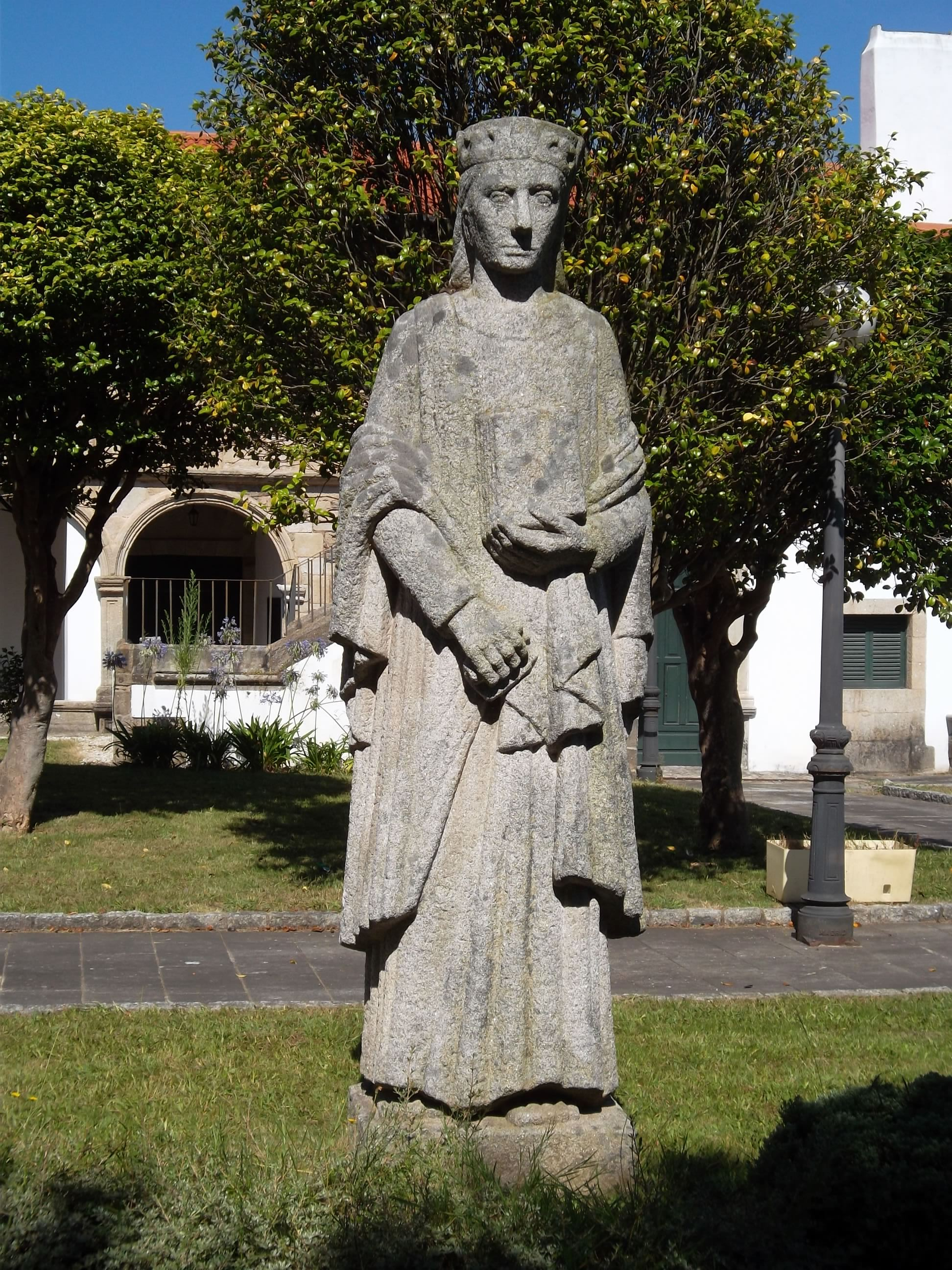 Pontedeume – Estatua do rei Afonso X “O Sabio” ubicada no claustro do antigo convento de San Agustin (hoxe Casa da Cultura). A obra en granito galego foi esculpida en 1970 polo ourensano Faílde.